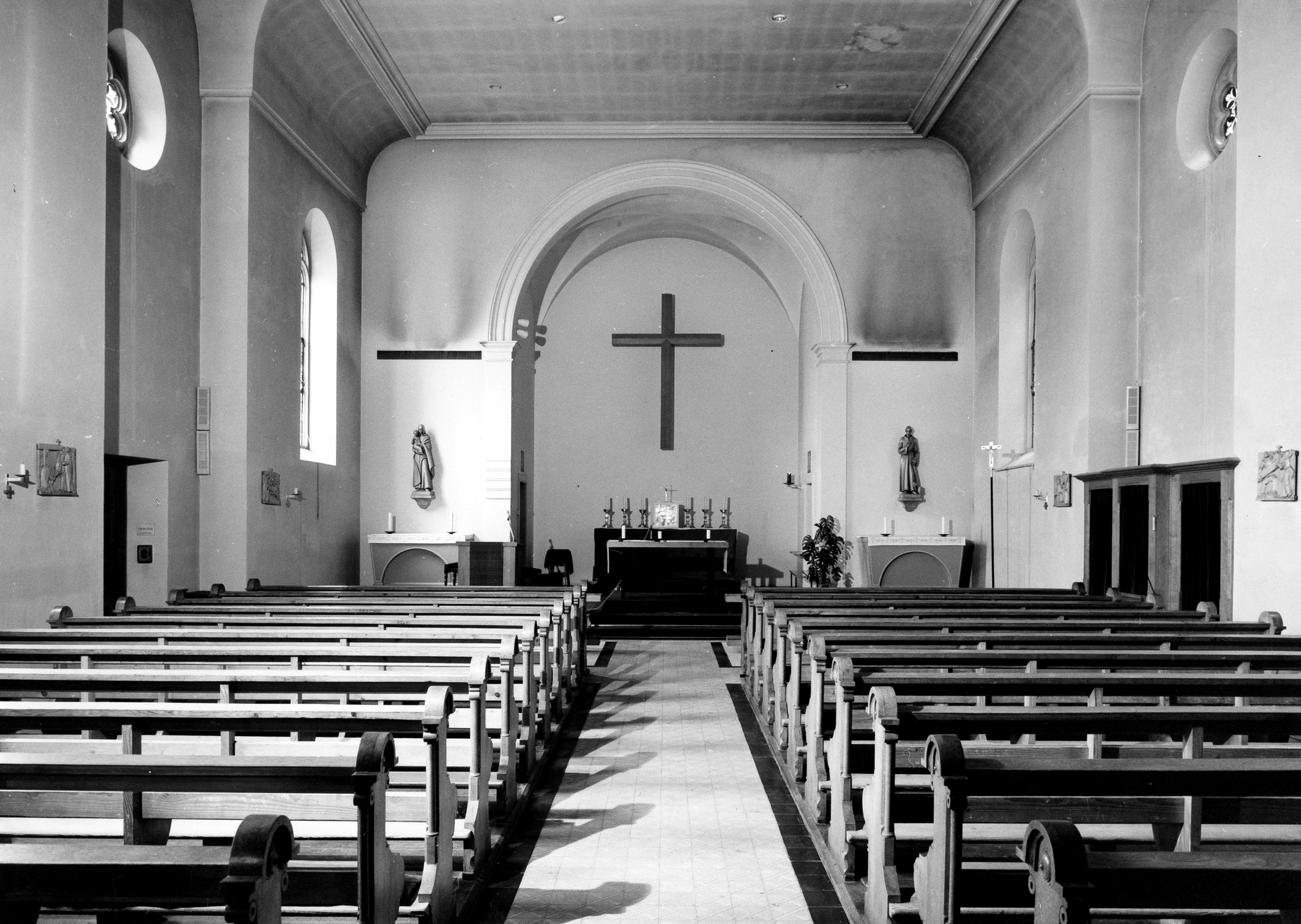 Römisch-katholische Pfarrkirche St. Pirminius Pfungen, Innenansicht von 1962-1977